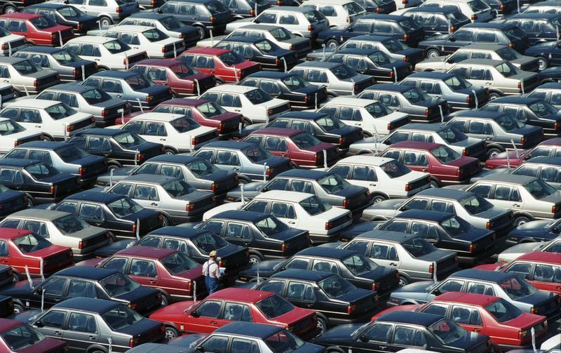 Juni 1988 Wolfsburg, Volkswagenwerk, 27 Computergesteuerte Qualitätskontrolle